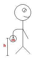 L'énergie gravitationnelle qui se produit durant la quille